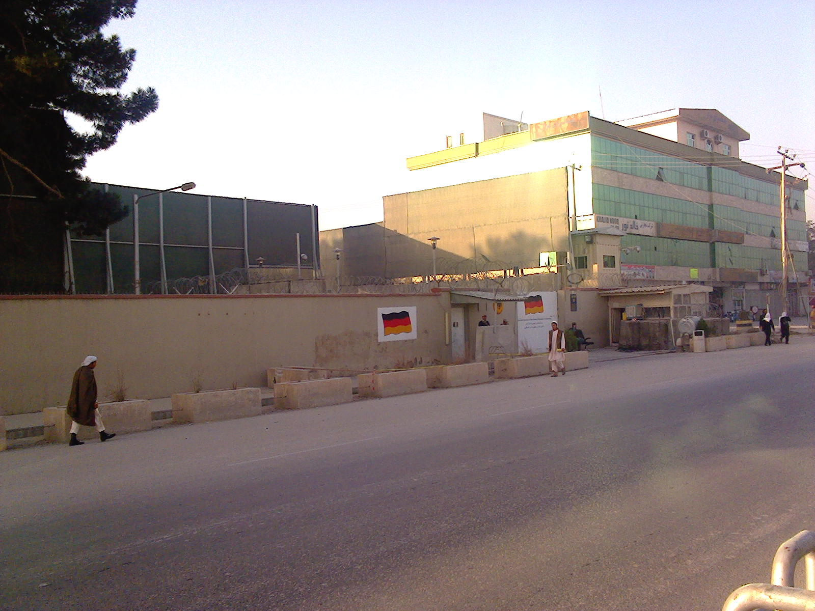 Außenansicht des festungsartig ummanteltem deutschen Generalkonsulat in Masar-i-Sharif, auf dem Gelände des vormaligen Mazar Hotels.